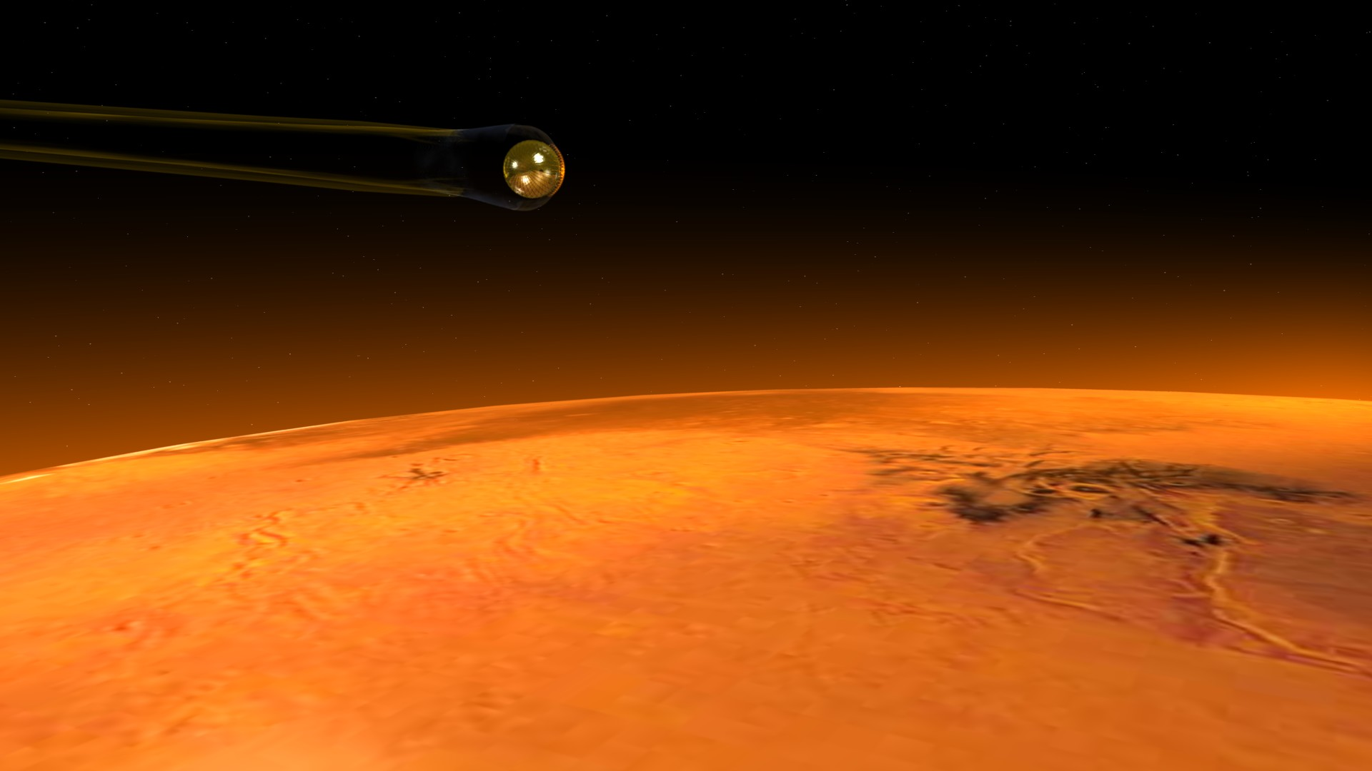 Archimedes beim Eintritt in die Marsatmosphäre